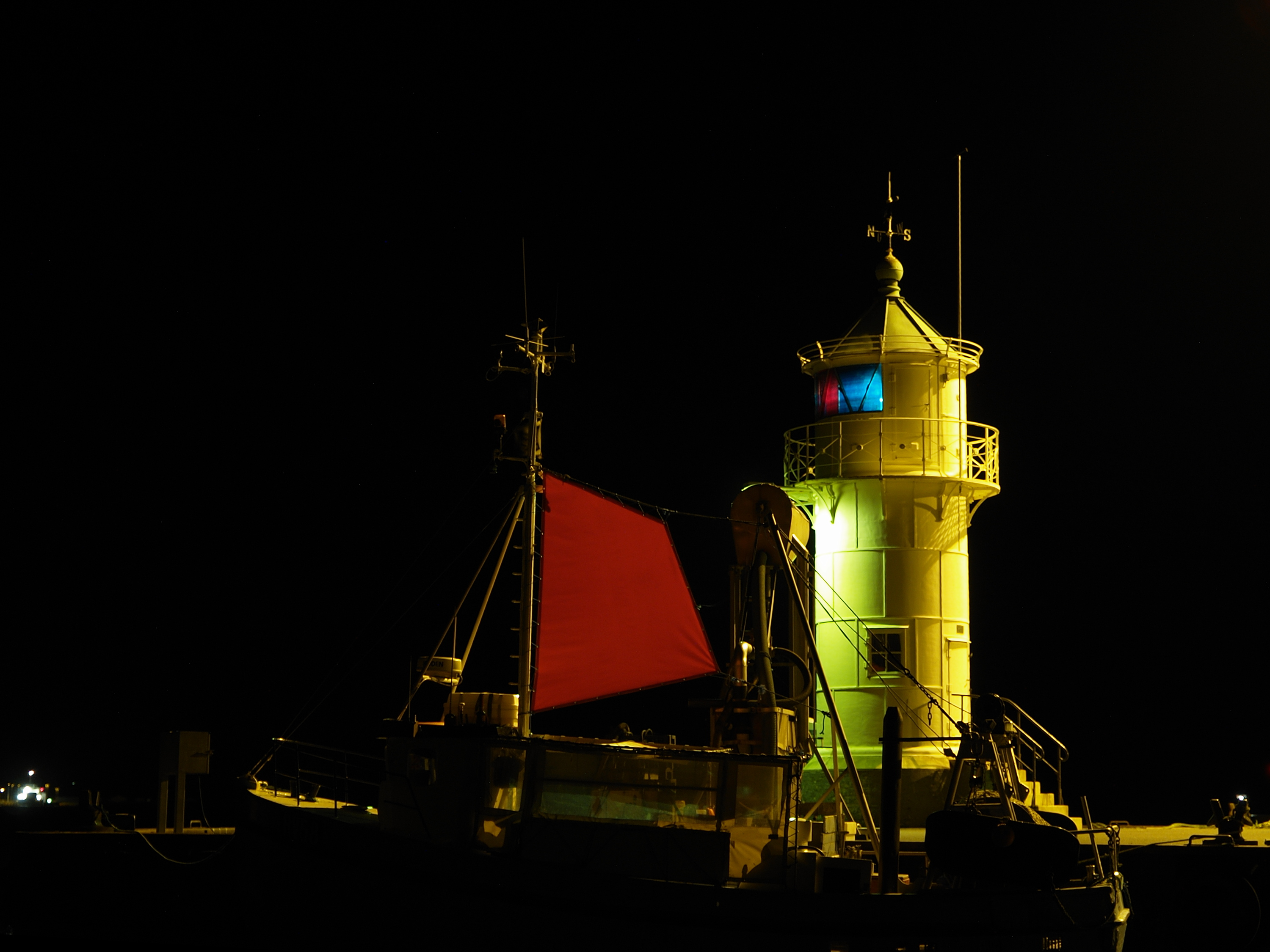 Der Leuchtturm von Arøsund an Jütlands Ostküste bei Nacht, Sektorenfeuer leuchtend